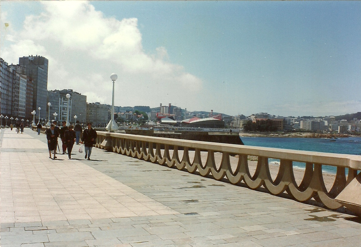 Paseo Marítimo de Riazor, A Coruña, España